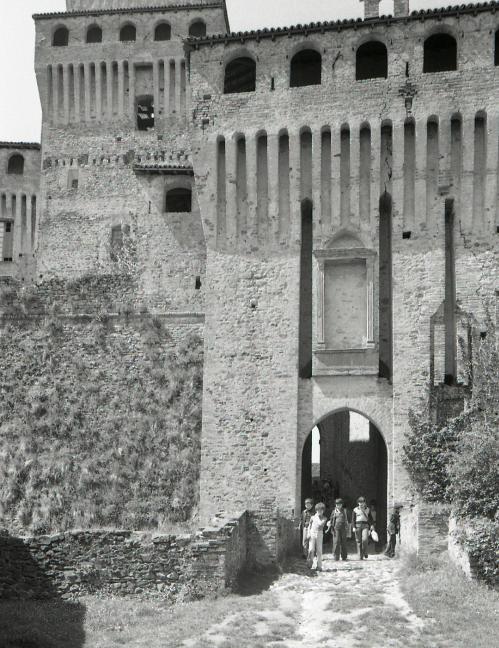 Servizio fotografico : Parma, 1976 / Paolo Monti. - Strisce: 6, Fotogrammi complessivi: 36 : Negativo b/n, gelatina bromuro d'argento/ pellicola ; 35 mm. - ((Sul portanegativi: N[I]K[MA]T FP4. - Occasione: Documentazione monumenti artistici Emilia-Romagna. - Fonte: Agenda di Paolo Monti: Leica 1501-3000 Controllo numerazione (1950-1978), presso Archivio Paolo Monti. - Fonte: Fattura di Paolo Monti: IV. Commesse/ Fattura n. 09/ Fotografie monumenti artistici Emilia-Romagna (1976/07/05), presso Archivio Paolo Monti